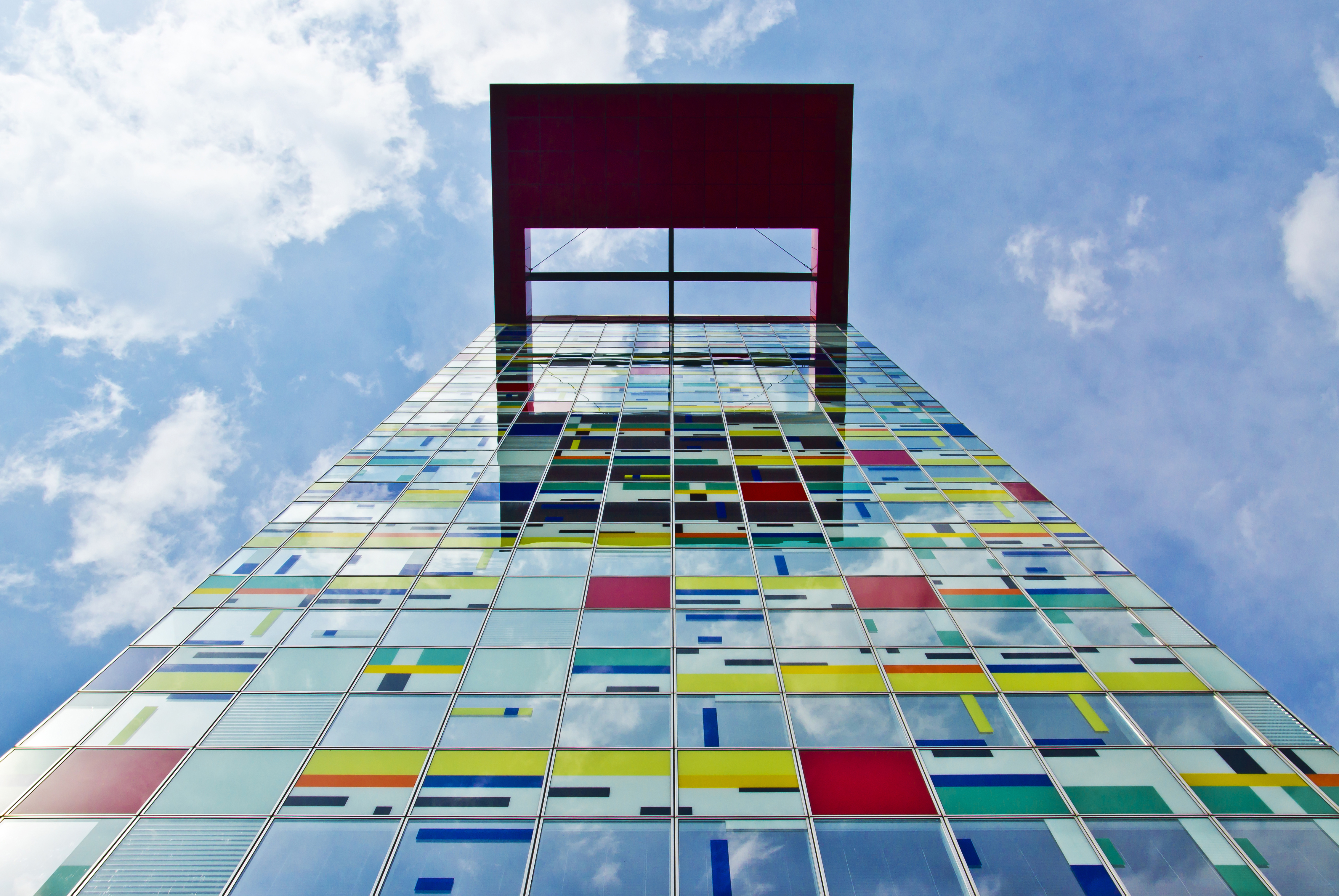 Colorium - Medienhafen - Düsseldorf - NRW - Germany